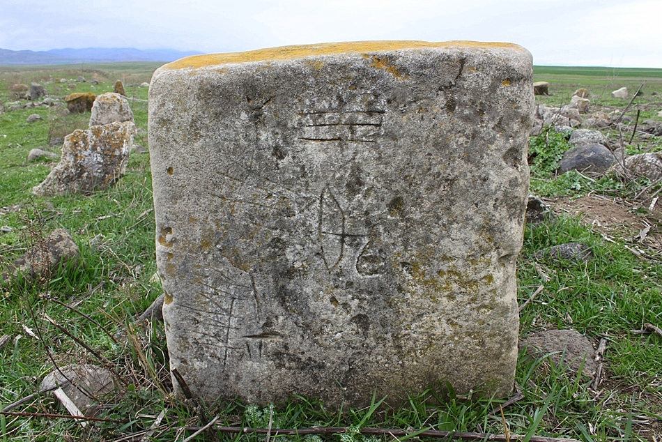 Нодгробие на древнем кладбище Наргизтепе на территории Ходжавендского района Азербайджана (бывший Мартунинский район НКАО)